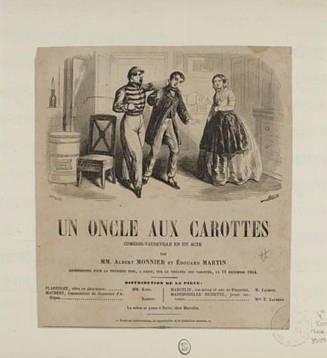 Un oncle aux carottes, comédie d'Albert Monnier et Edouard Martin : estampe